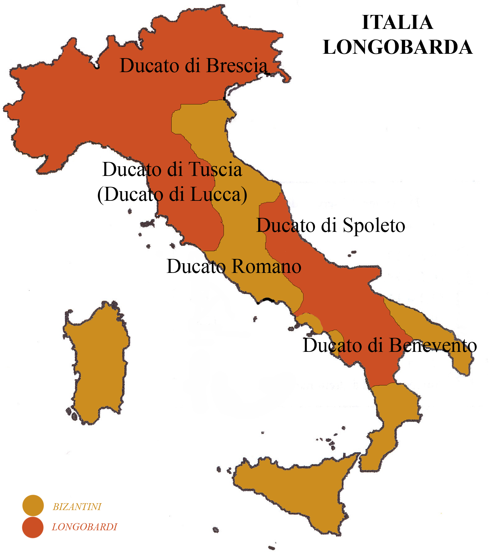 Situazione dell'Italia nell'epoca longobarda. Indicati alcuni dei deucati che hanno caratterizzato il periodo interessato (Ducato di Brescia, Ducato di Tuscia o Ducato di Lucca, Ducato di Spoleto, ecc,)